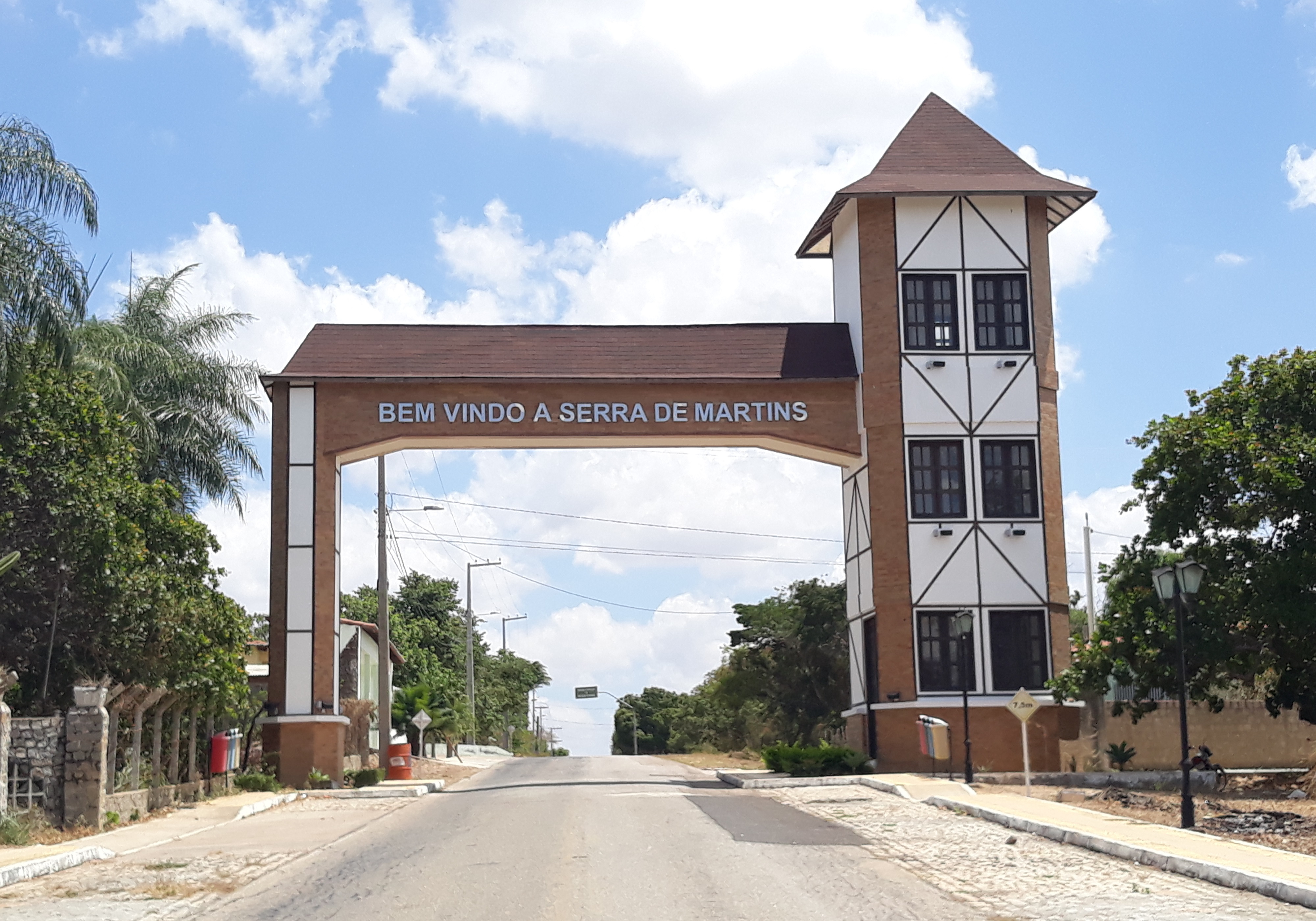 Pórtico de entrada de Martins, no Rio Grande do Norte (Brasil), às margens da rodovia estadual RN-117.